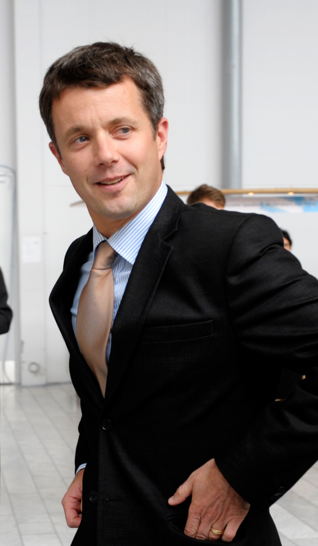 Frédéric, prince héritier de Danemark